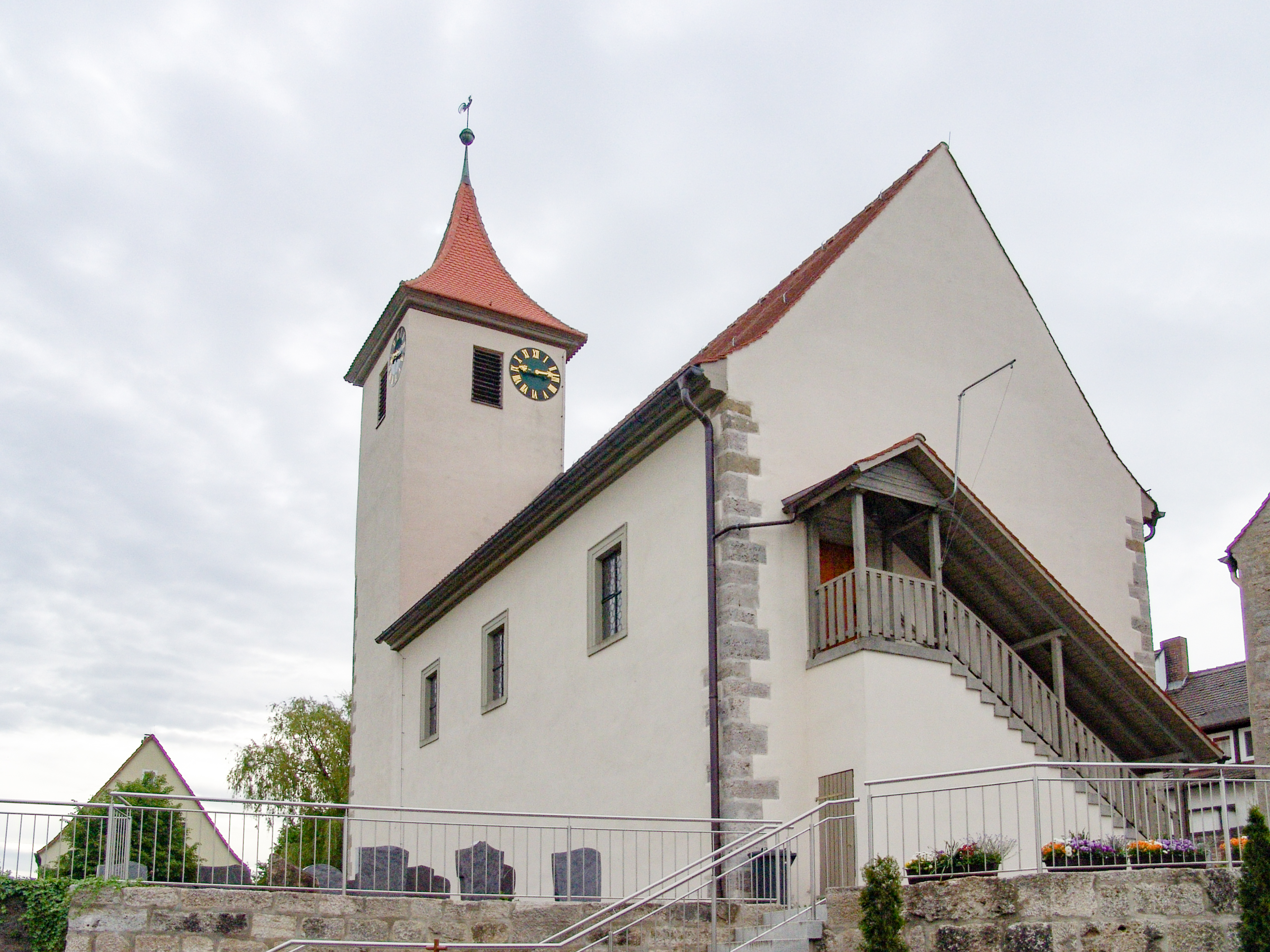 evang.-luth Kirche St. Nikolaus in Adelshofen